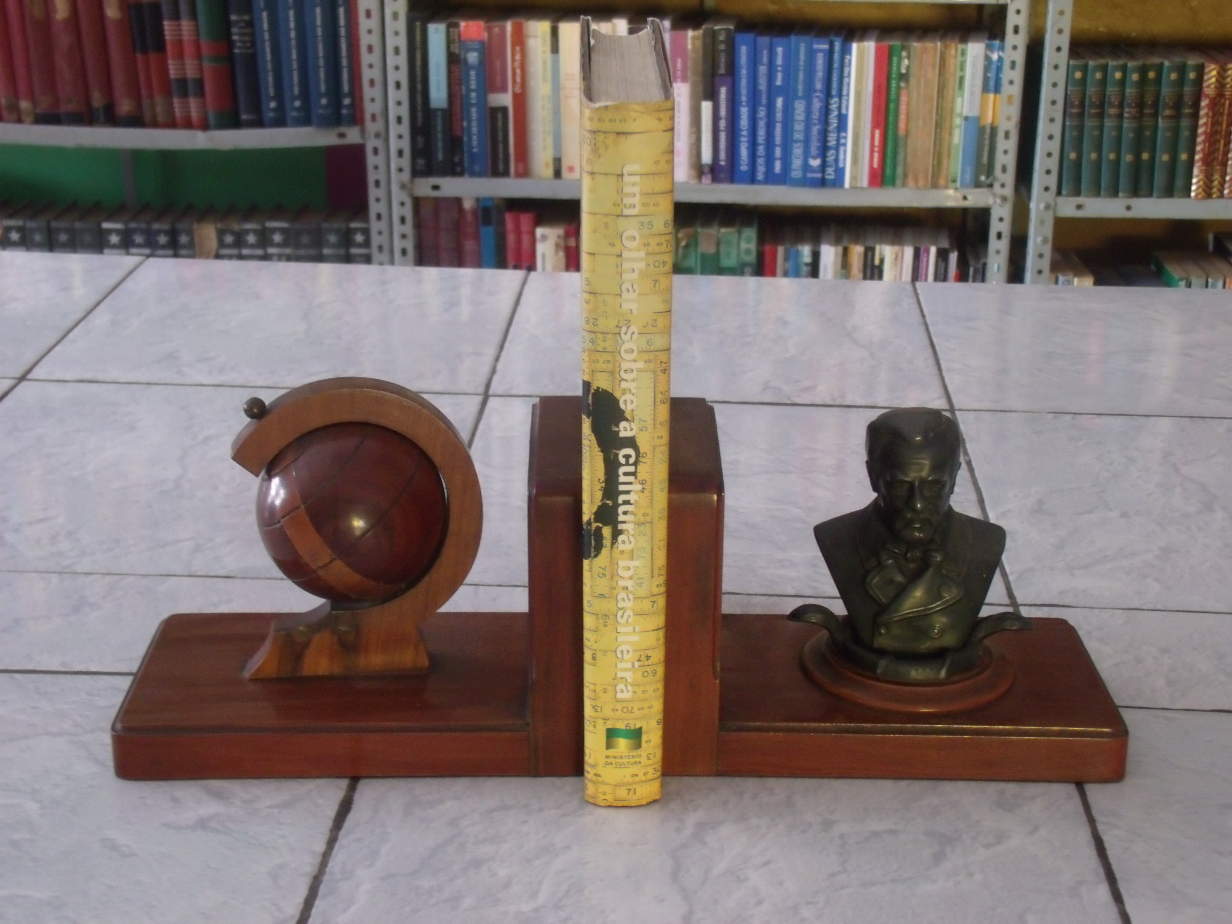 Obra de vários autores, Um olhar sobre a cultura brasileira, sob organização de Francisco weffort e Márcio Souza, editada em 1998. Ministério da Cultura.